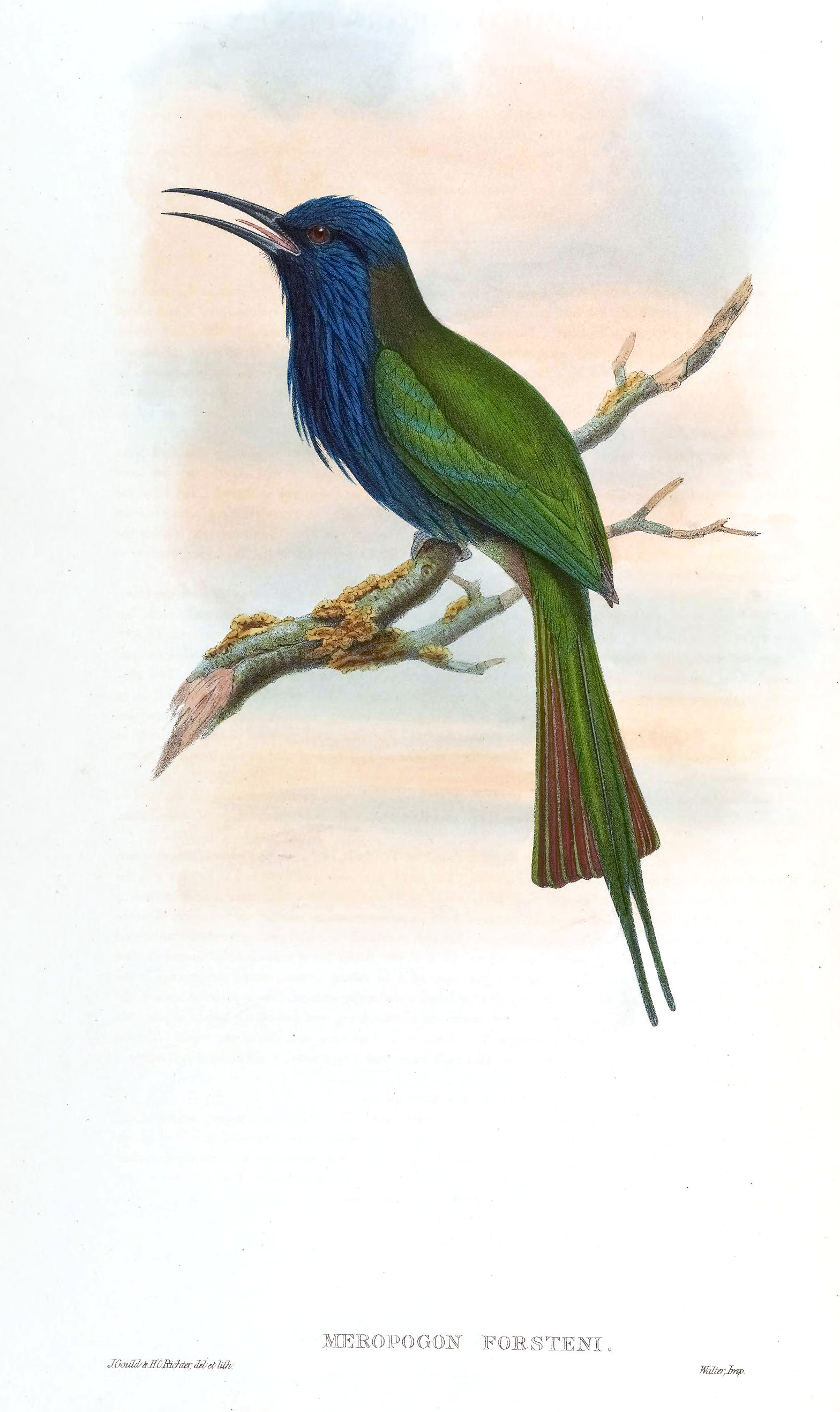 Meropogon forsteni